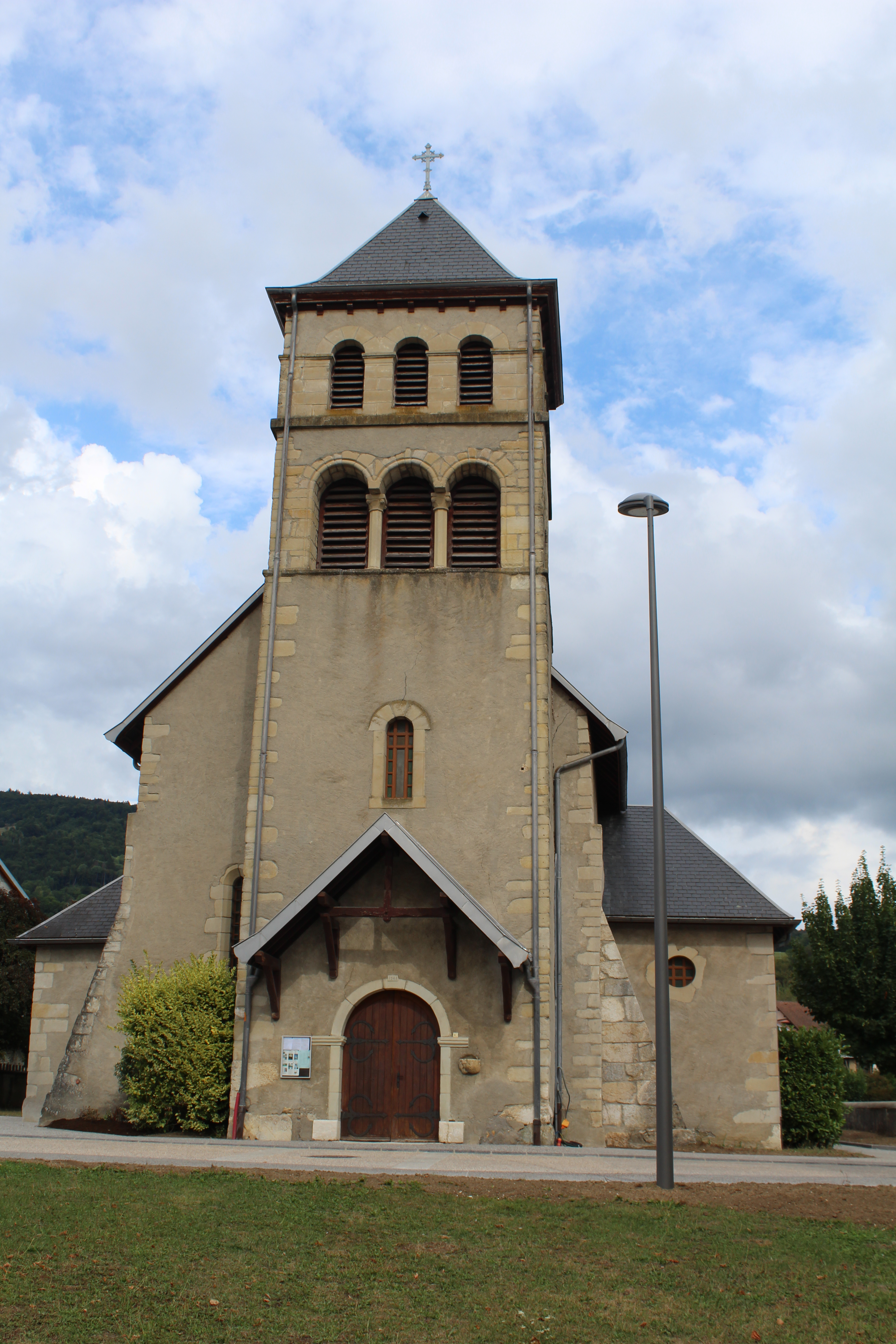 Église Saint-André de Copponex.